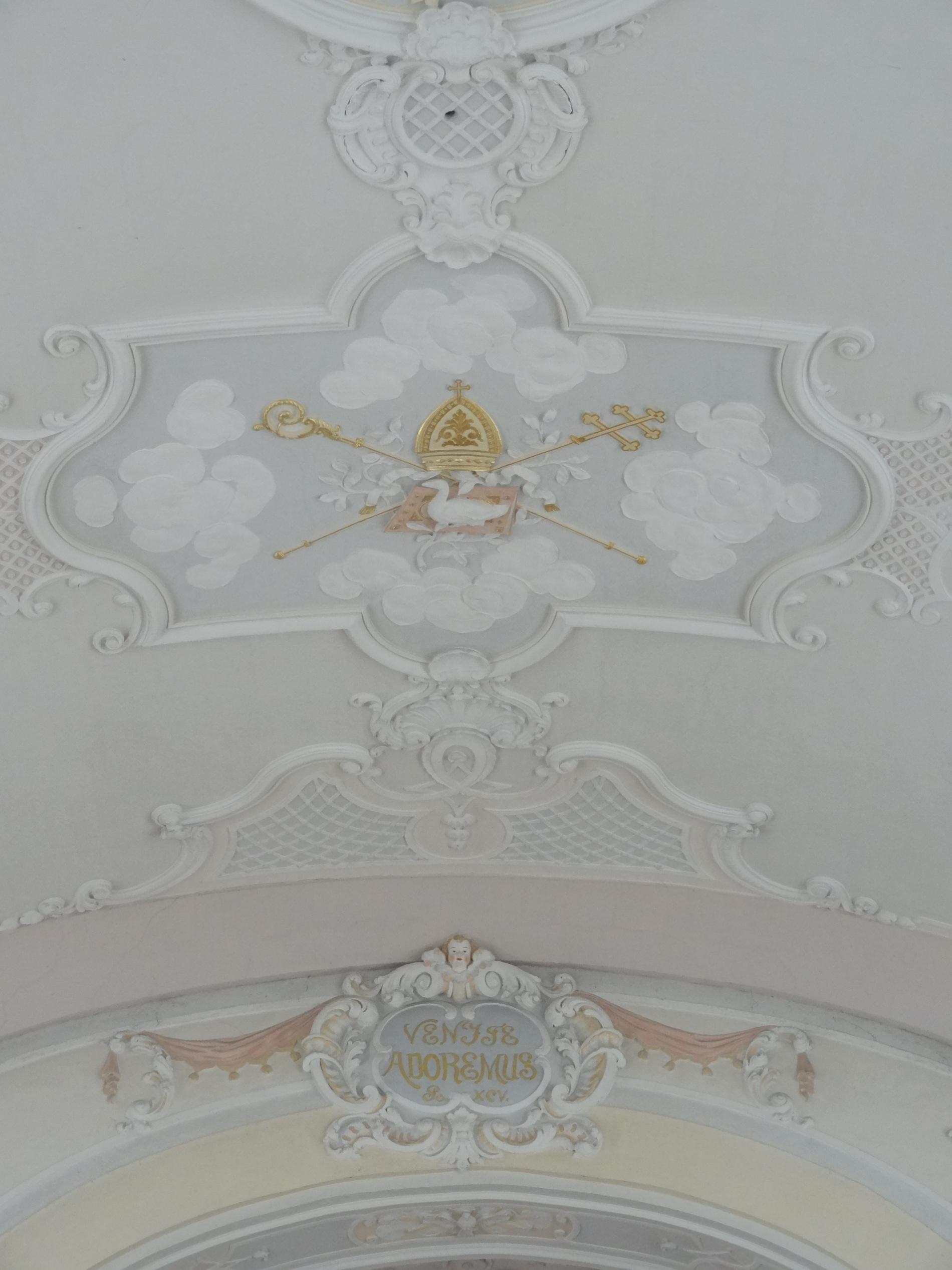 Stuckelemente am Langhausgewölbe und Chorbogen der Pfarrkirche St. Martin in Langenpreising (Landkreis Erding, Oberbayern)